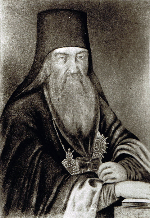 Дамаскин (Аскаронский) Епископ Костромской 1753-1769